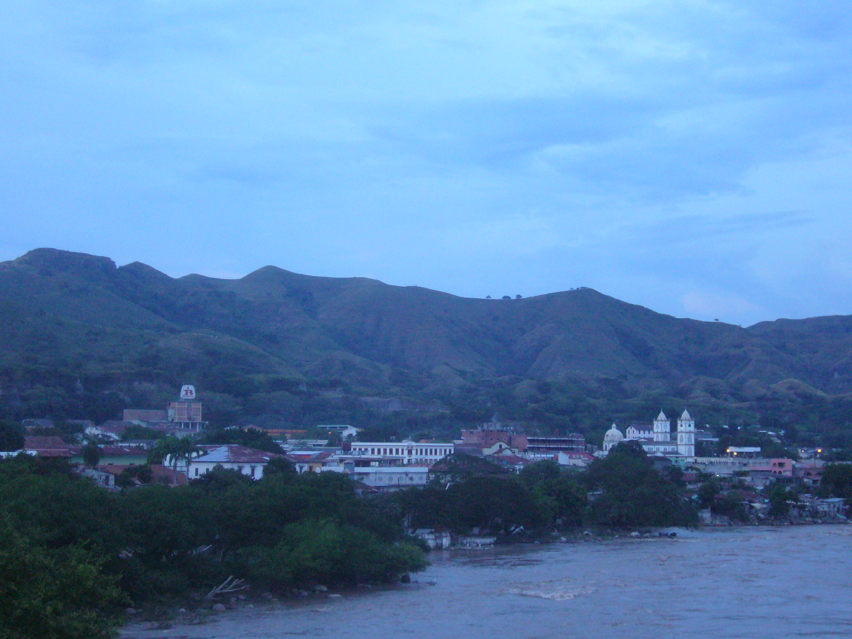 Vista de Honda (Colombia) desde el río Magdalena.